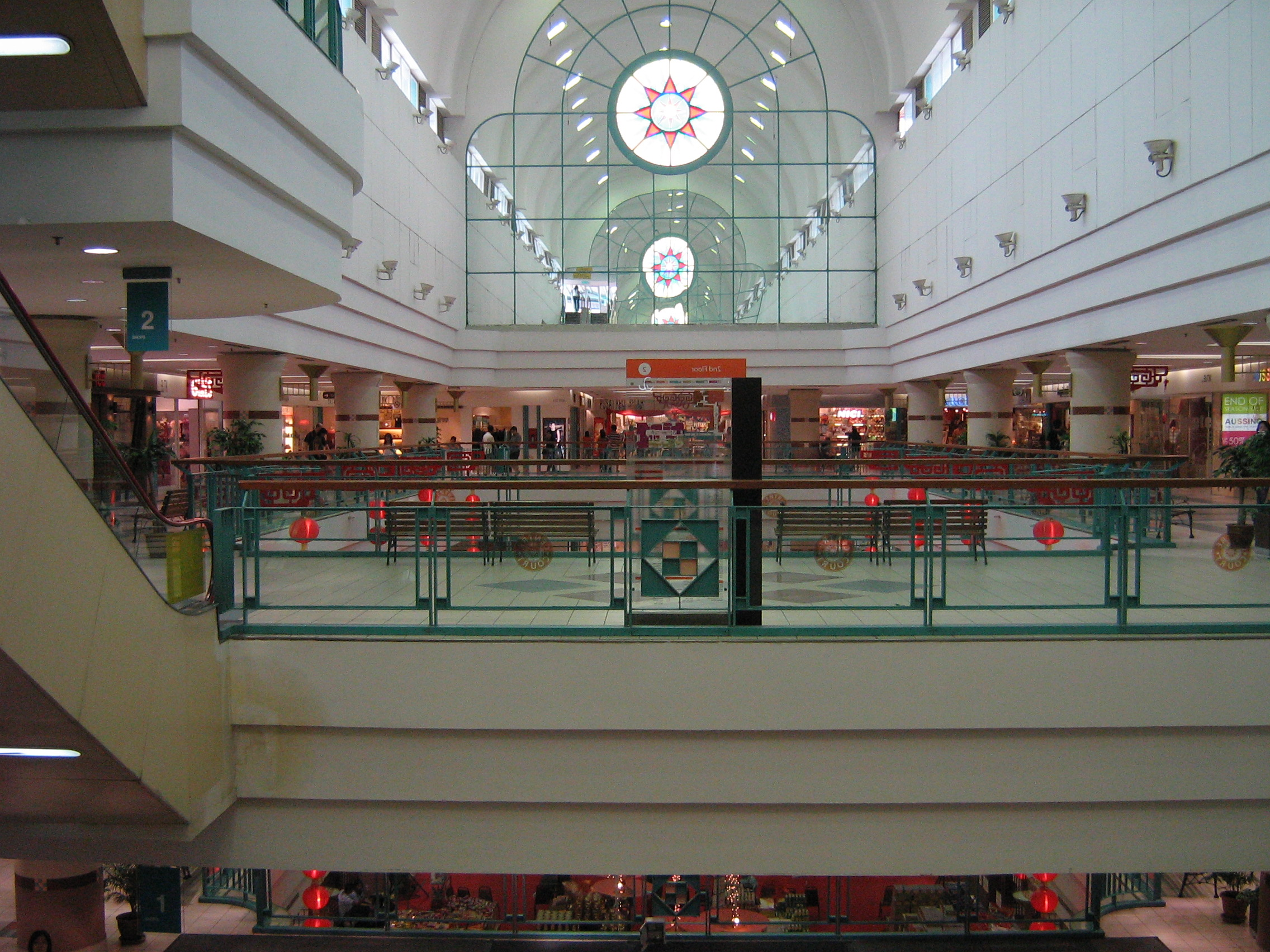 1 utama mall in petaling jaya, malaysia